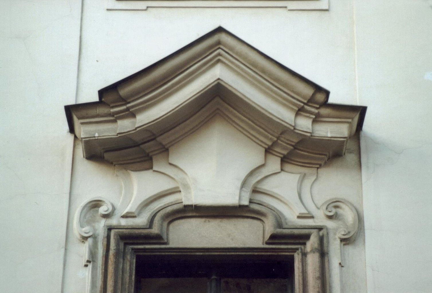 Suprafenestra na fasádě Kolovratského (Thunovského) paláce v Praze